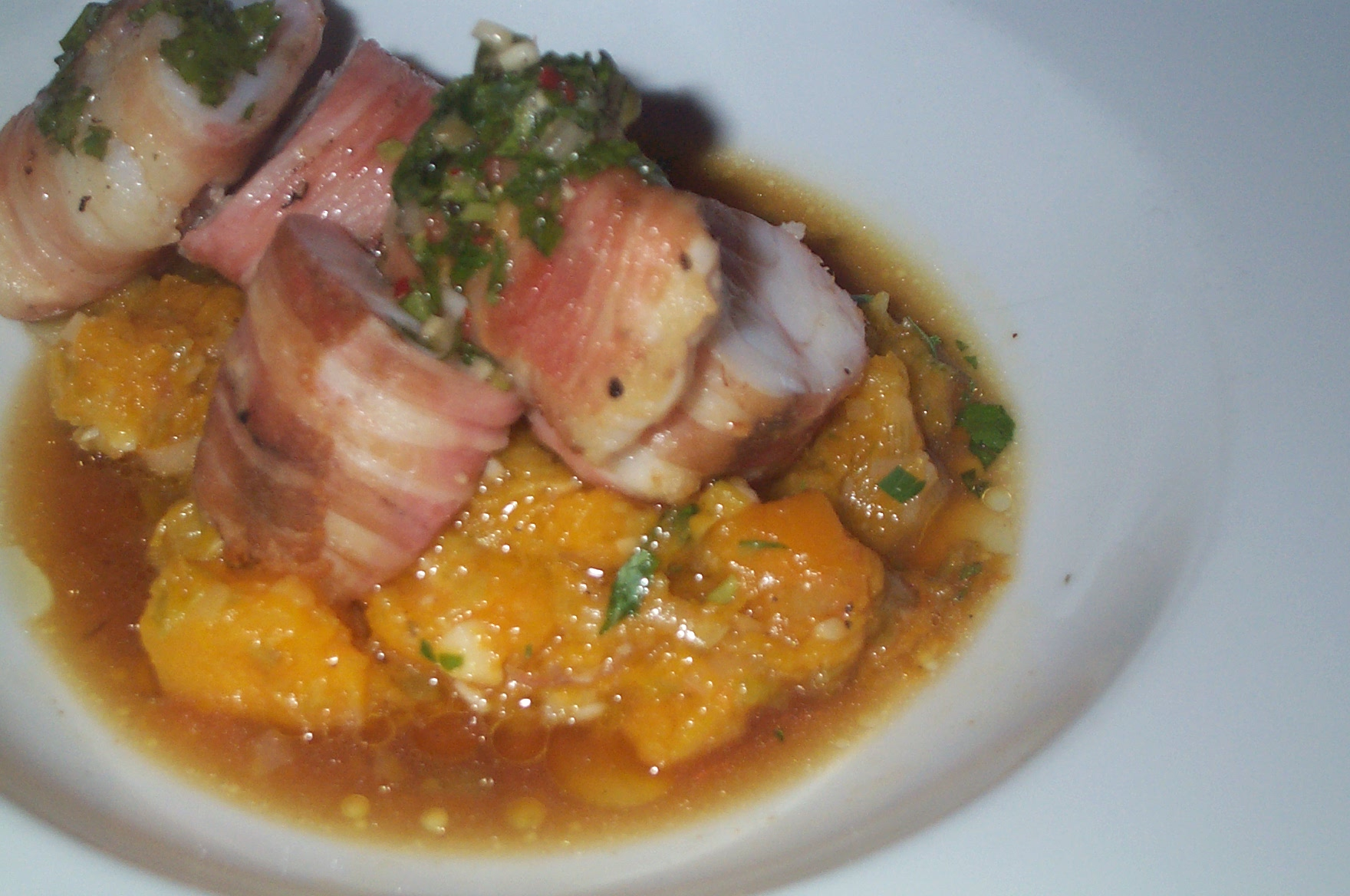 Bourride